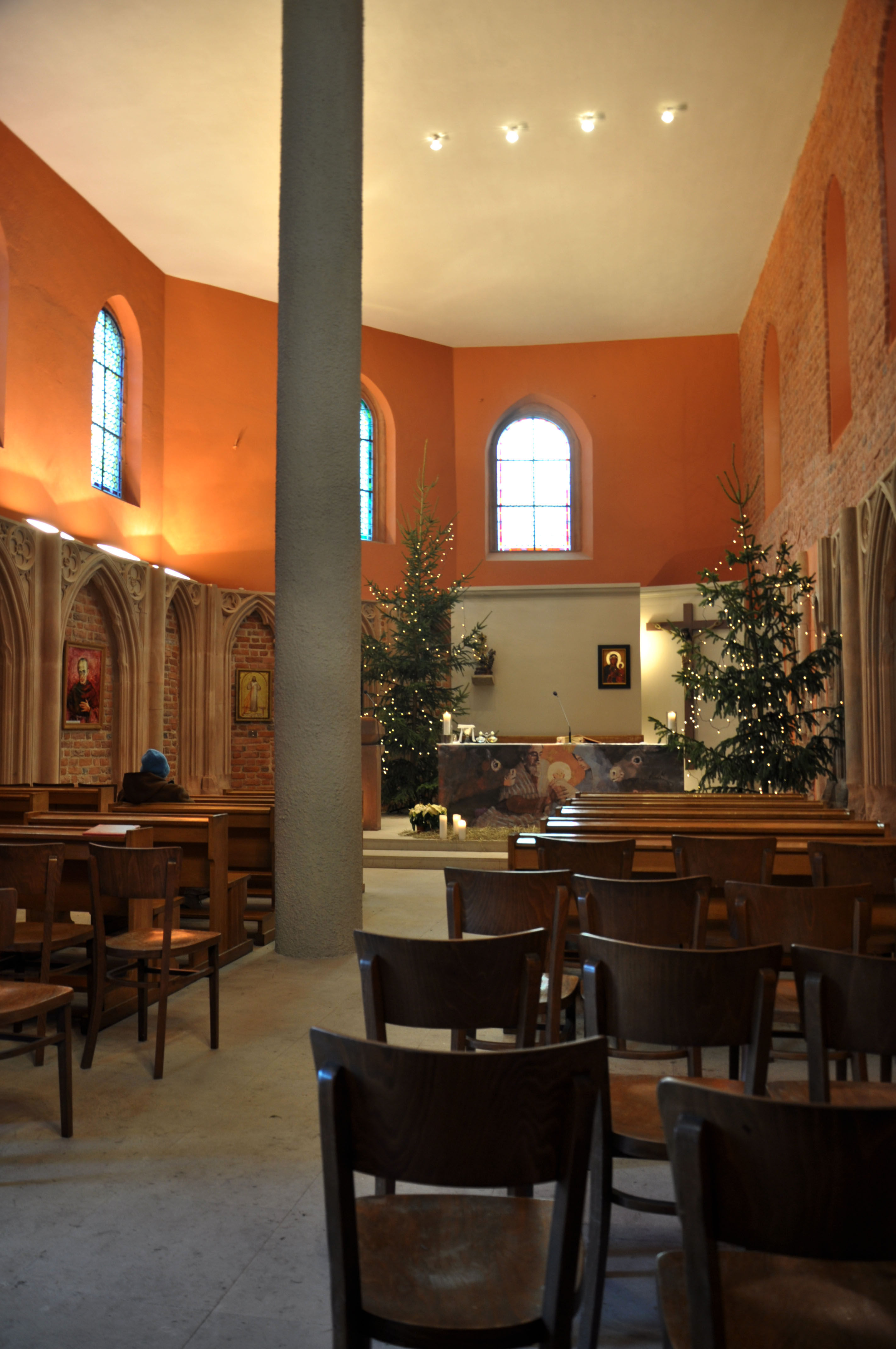 Wrocław, kościół p.w. św. Marcina, XIII, 1958-1968